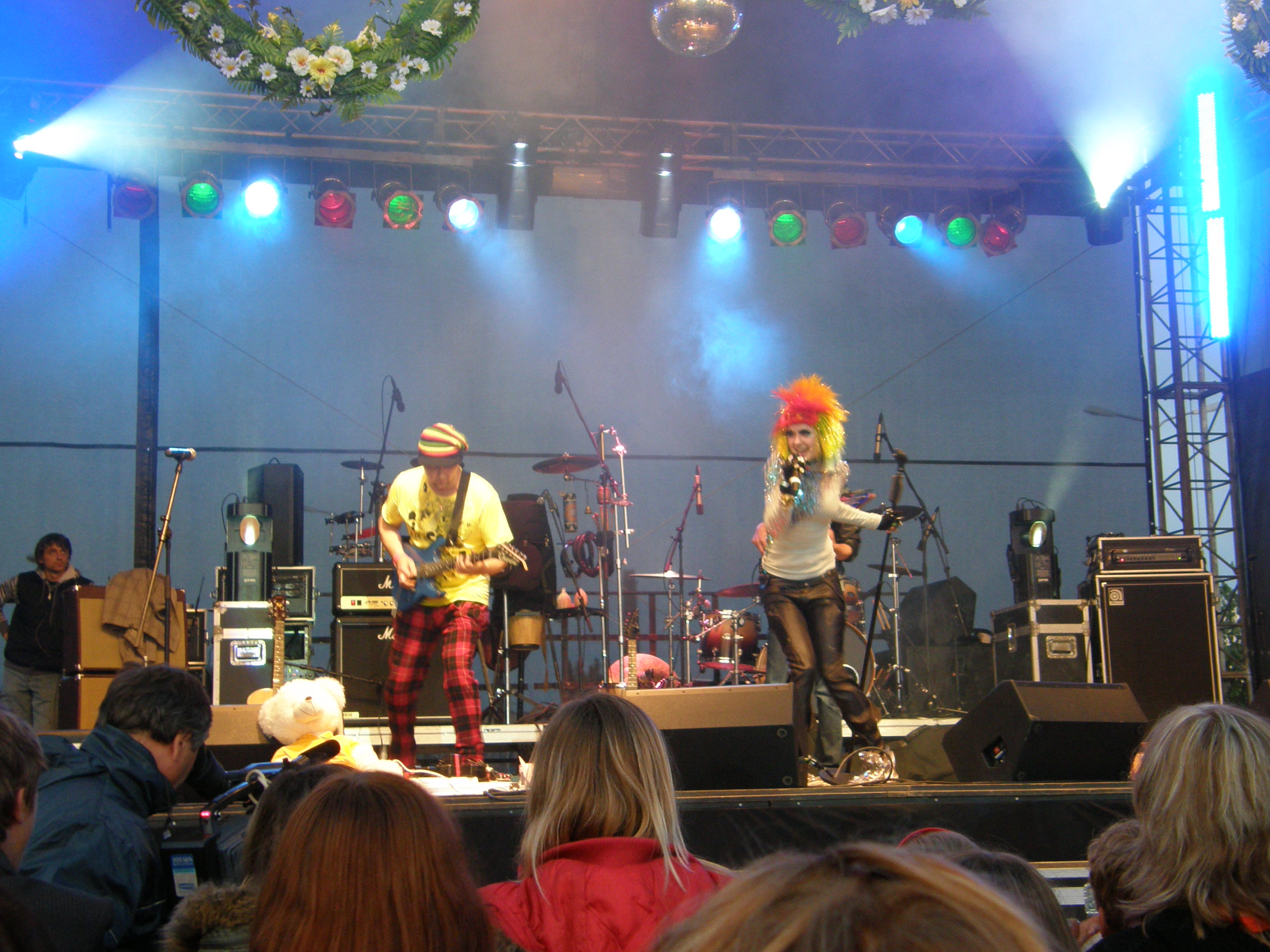 Grupa Triānas Parks uzstājas Jēkabpils pilsētas svētkos 2009. gadā